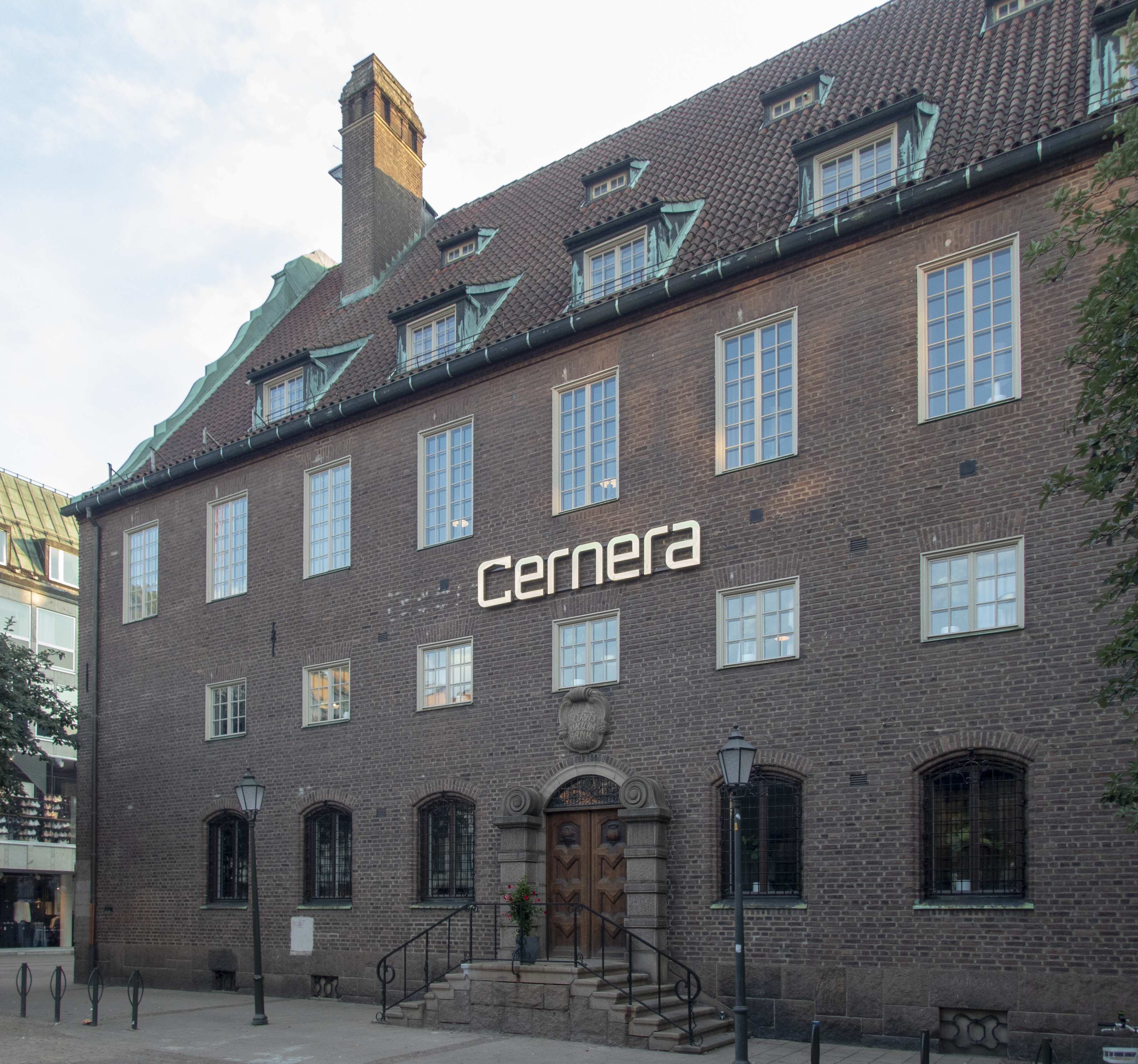 Merkurius 1 - uppfört av och för Borås Enskilda Bank 1914-1915. Arkitekt: Ivar Tengbom